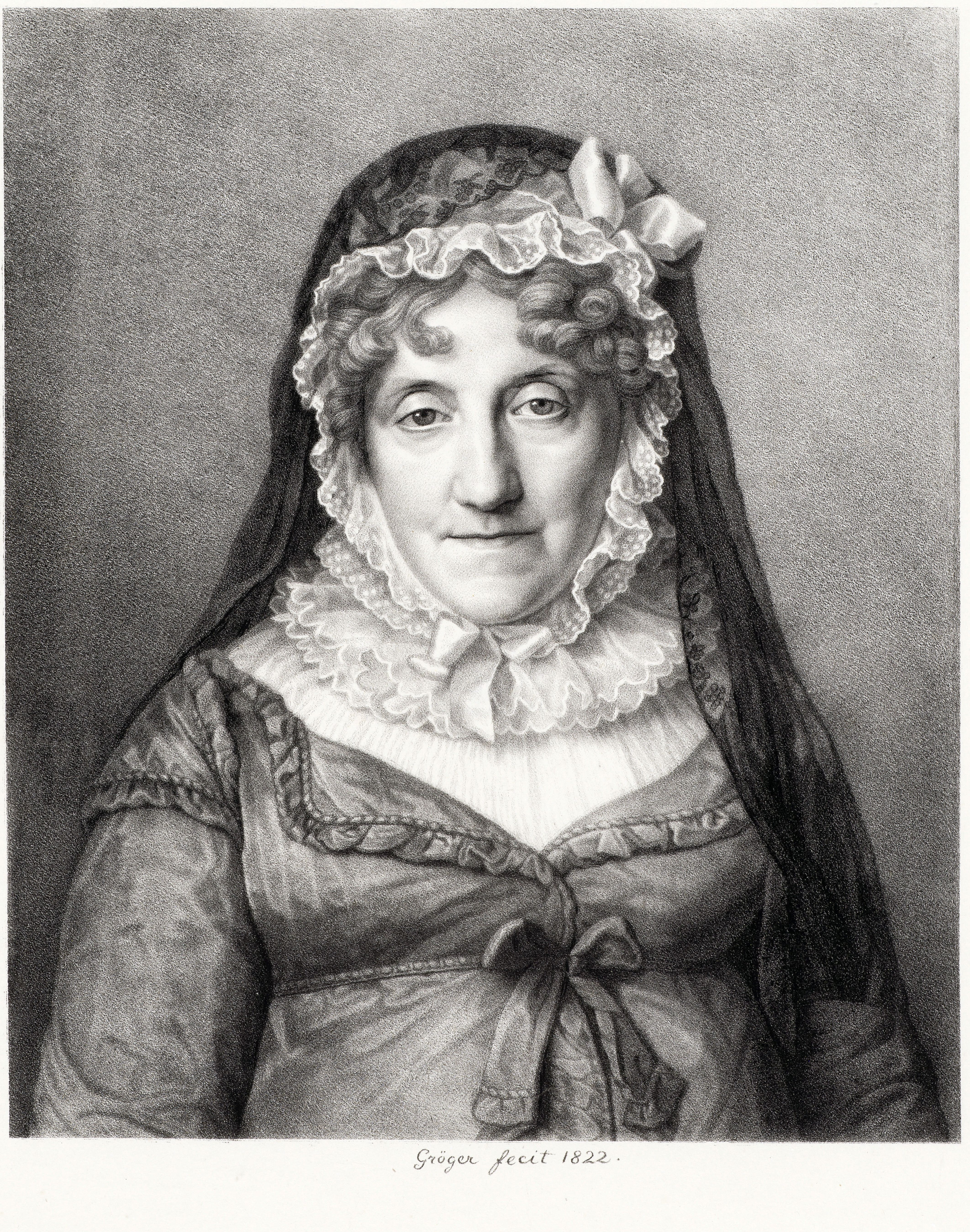 Bildnis von Sieveking